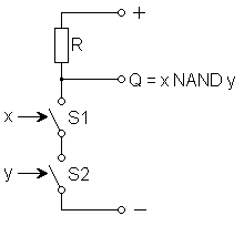 Funktionsprinzip eines NAND-Gatters